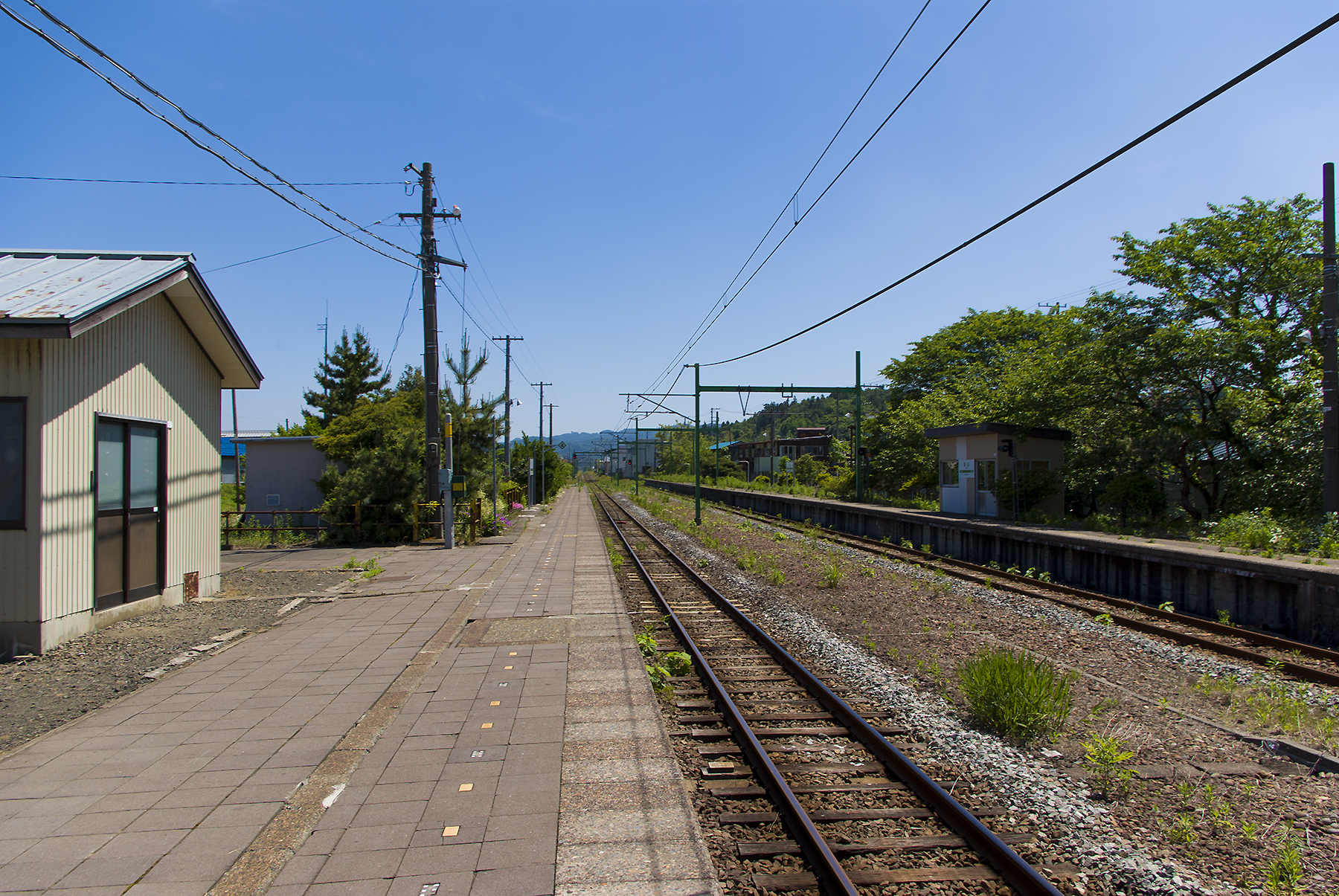 東日本旅客鉄道株式会社越後線西山駅